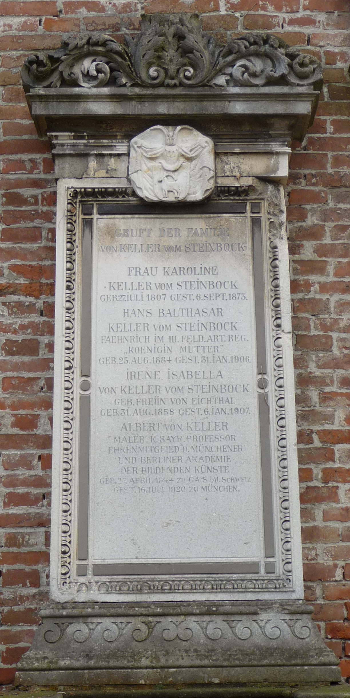 Albert von Kellers Grabmal im neuen Teil des Alten Südfriedhofs in München